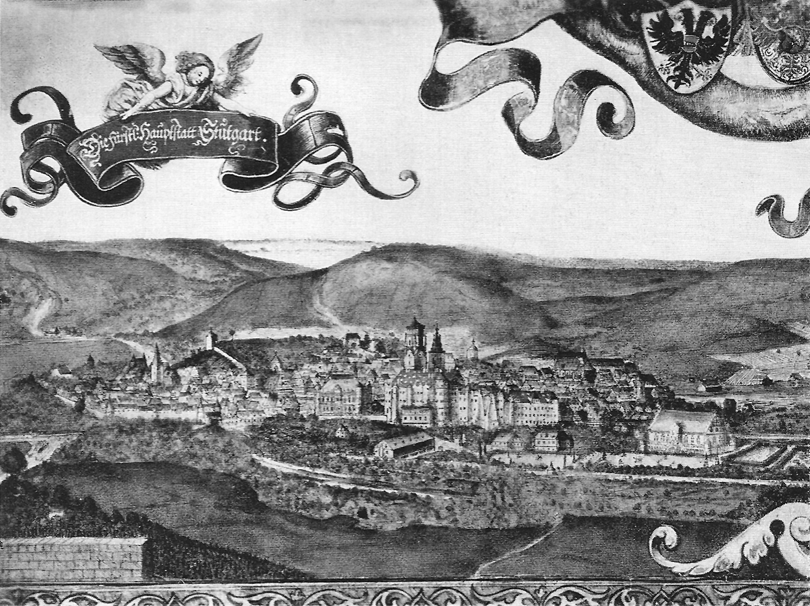 Ansicht von Stuttgart (Radierung, Ausschnitt). Im Gegengensatz zu früheren Ansichten ist hier links neben dem Schloss der Neue Bau zu sehen.